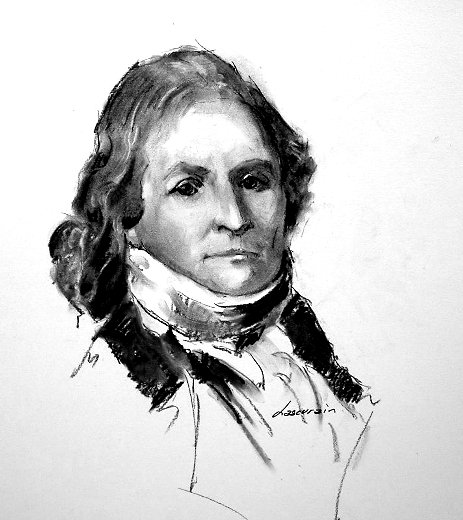 Dibujo de L. Lascuráin.